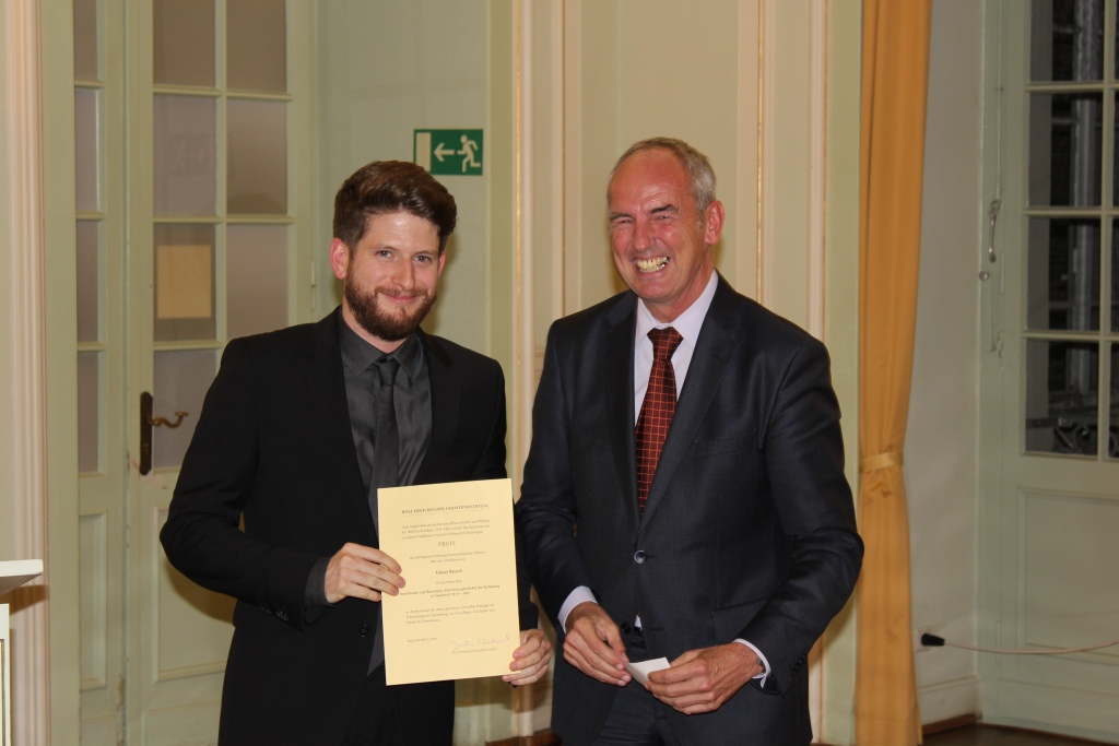 Wolf-Erich-Kellner-Preis Verleihung 2016. Fabian Rausch, Laudator Prof. Joachim Scholtyseck